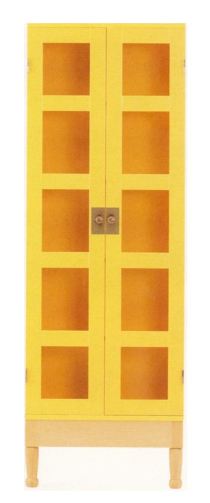 Mats Theselius skåp "National Geographic" från 1988